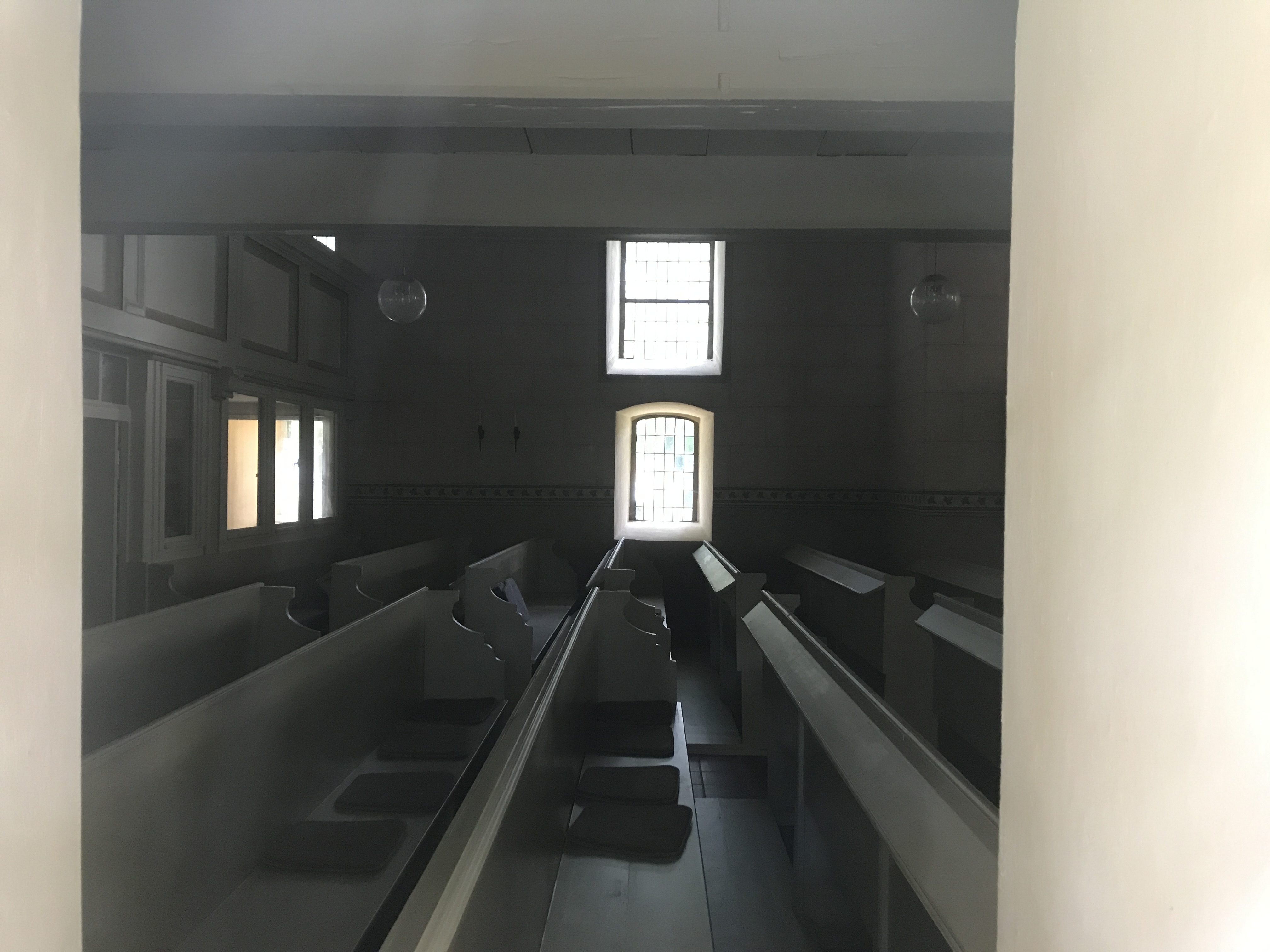 Die Dorfkirche Hasenfelde der Gemeinde Steinhöfe ist eine spätgotische Saalkirche, die 1901 umgebaut wurde. Im Innern steht unter anderem eine Kanzel aus dem Anfang des 18. Jahrhunderts.